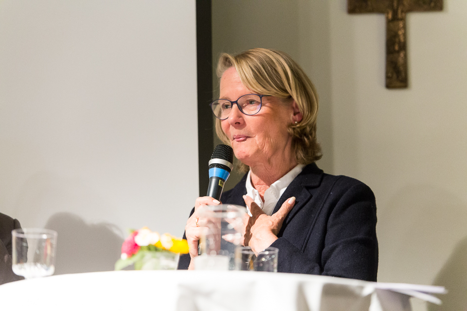 Doraja Eberle als Moderatorin